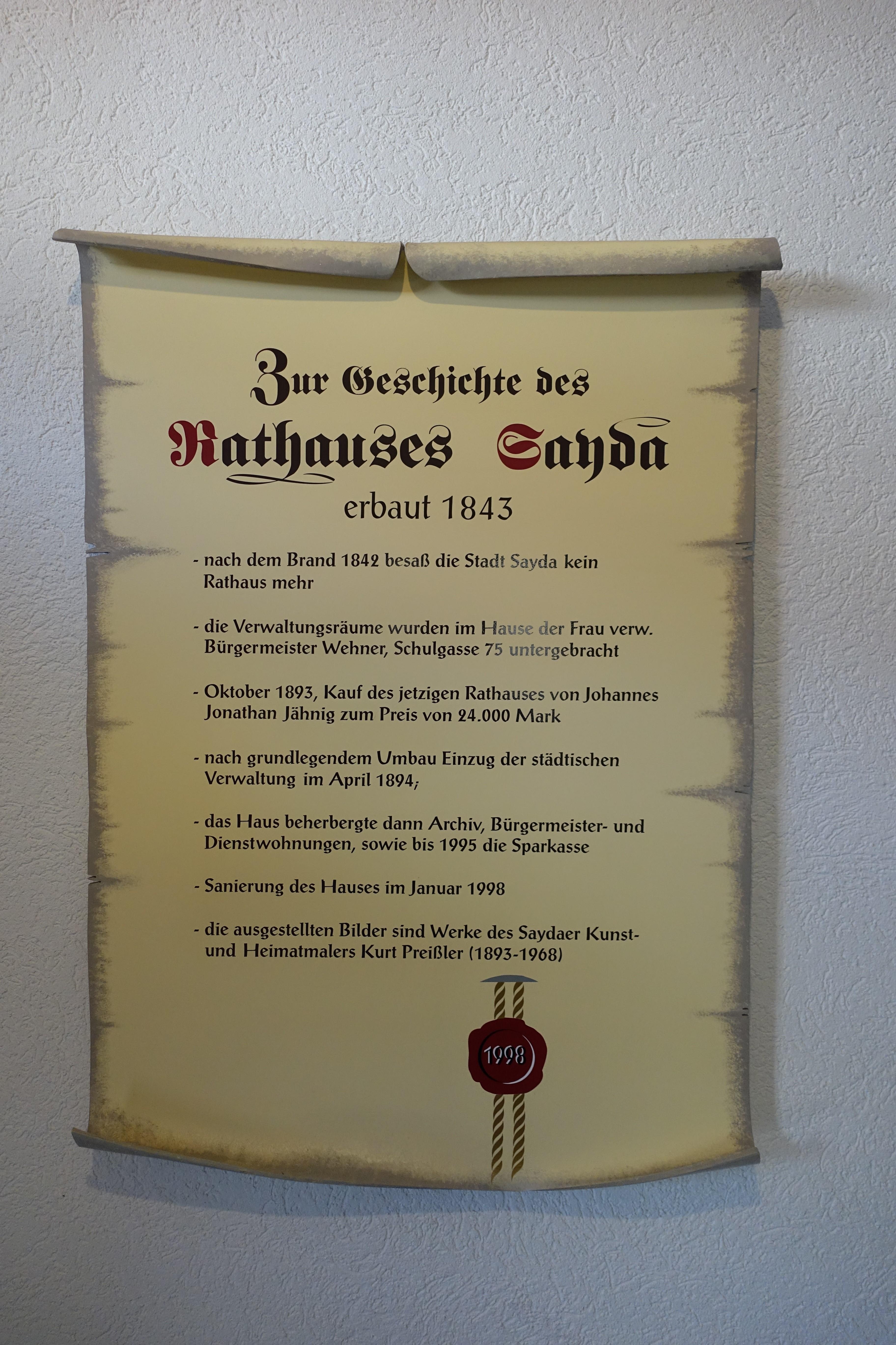 Bild vom Rathaus Sayda